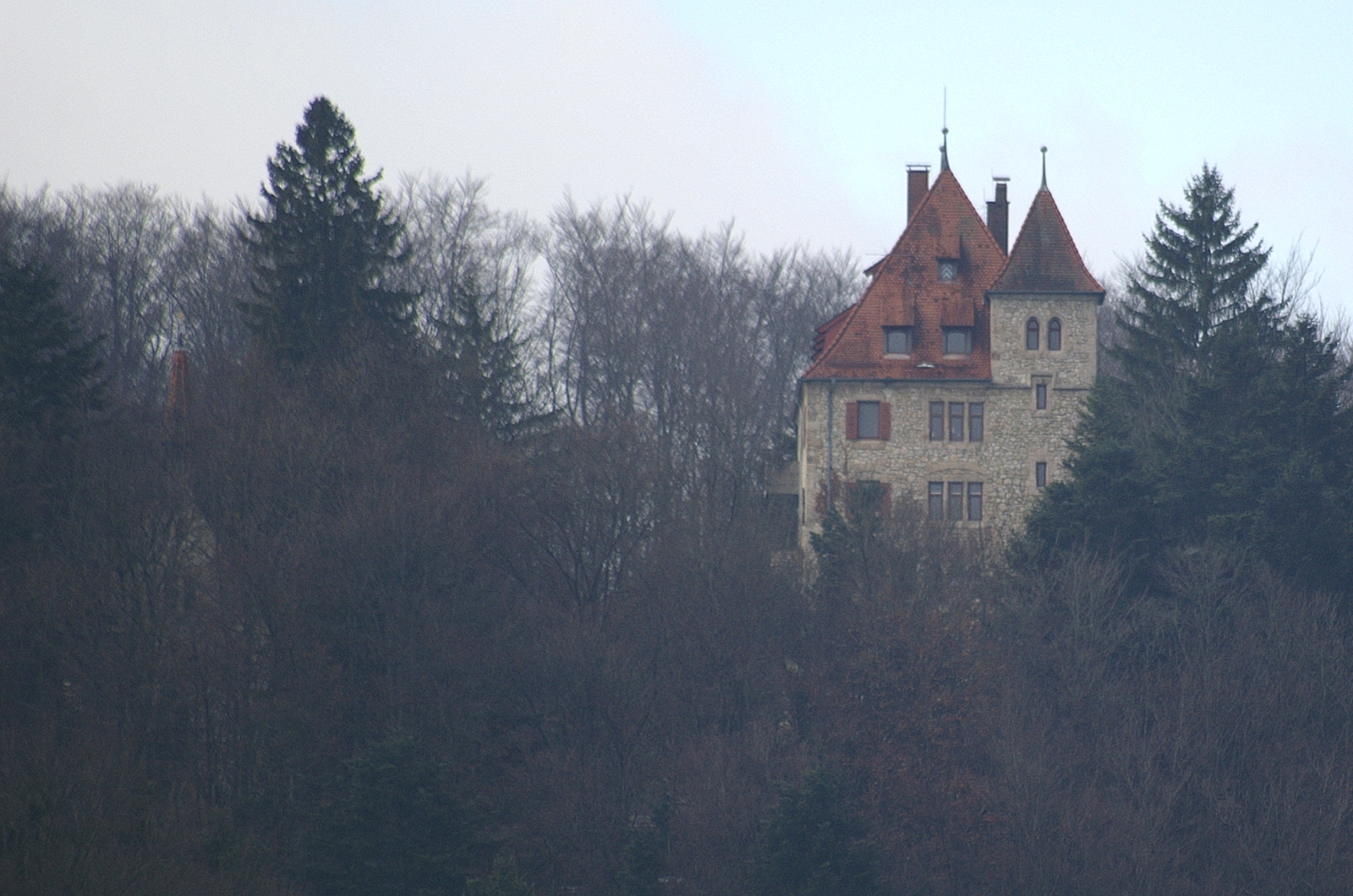 Schloss Neusteußlingen steht auf einem Bergsporn im oberen Schmiechtal